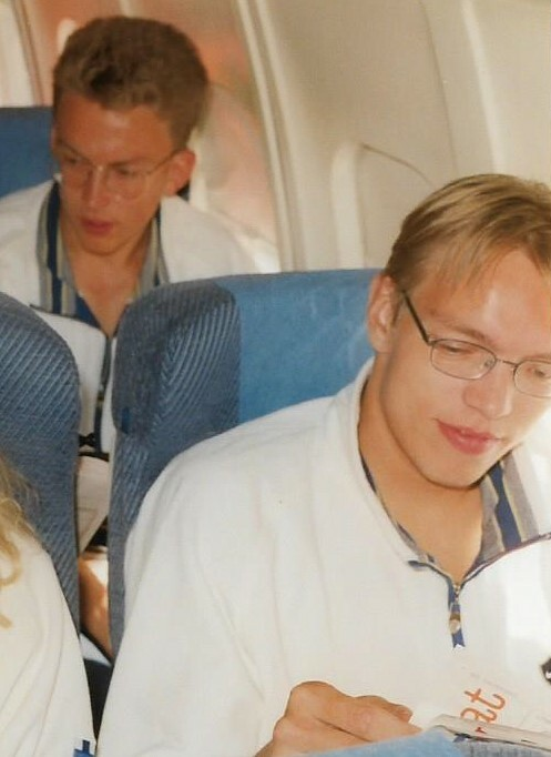 Korkeushyppääjä Oskari Frösén (edessä) ja pituushyppääjä Otto Kärki (takana) lentokoneessa matkalla yleisurheilun Euroopan-mestaruuskilpailuihin Budapestiin 17. elokuuta 1998.